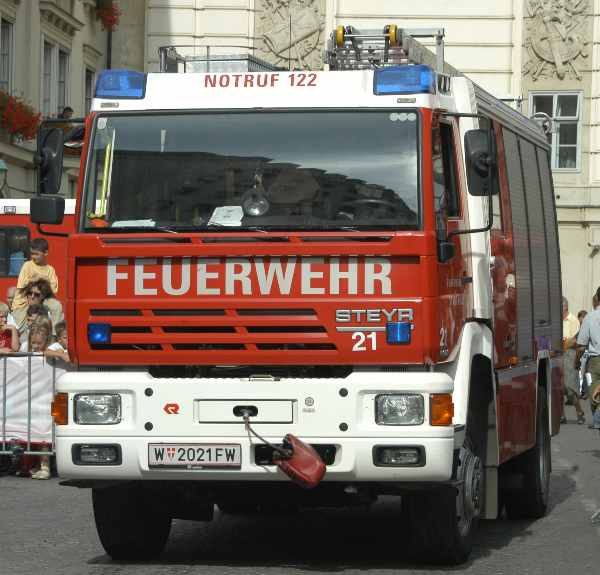 Feuerwehrauto der Berufsfeuerwehr Wien